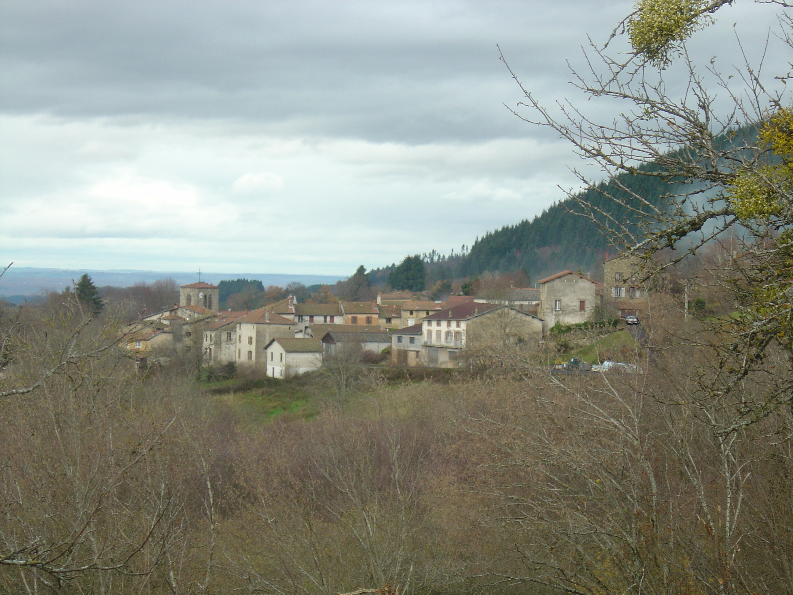 Vue générale d'Olmet